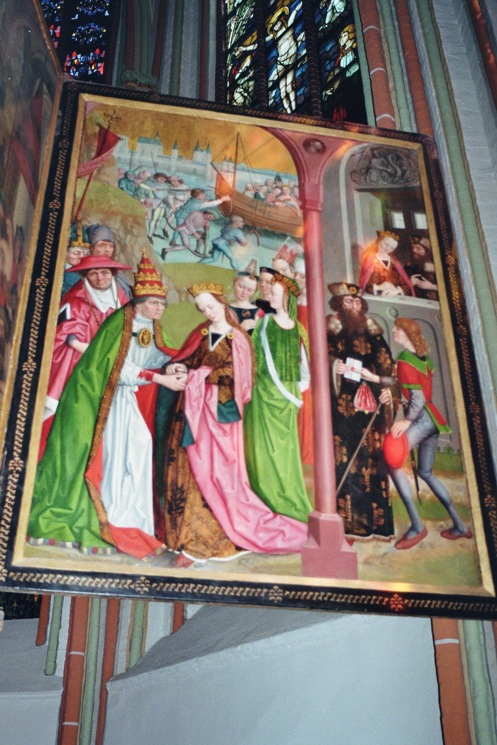 Lüneburg, St. Johannis, Hauptaltar, Tafel von Hinrik Funhof, 1482–1484: Legende der hl. Ursula